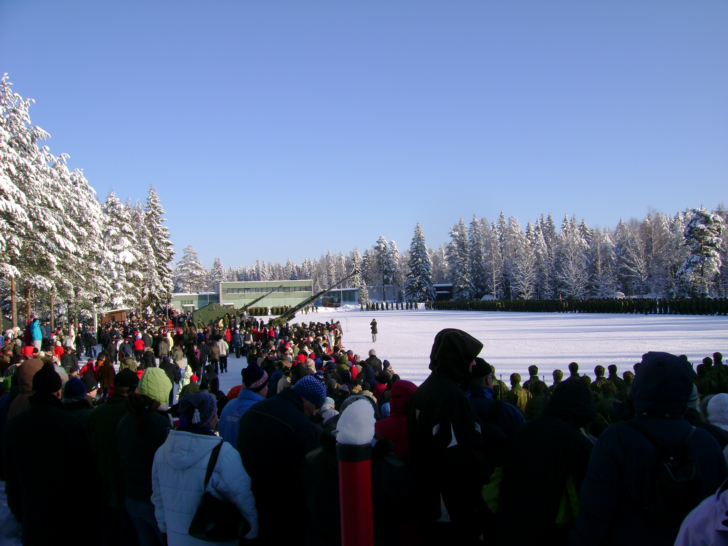 Military Parade @ Karelia Brigade